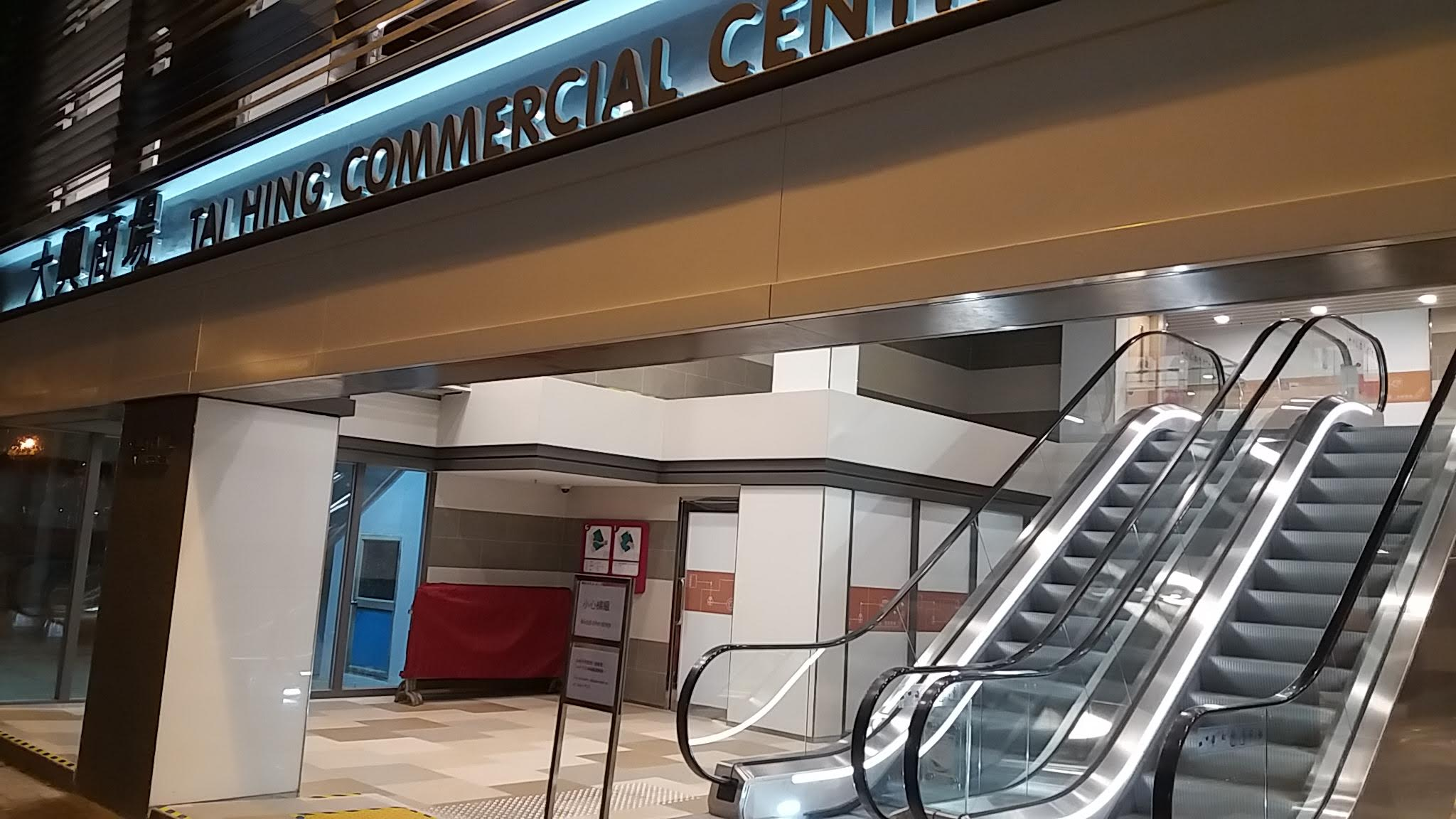 大興商場2016